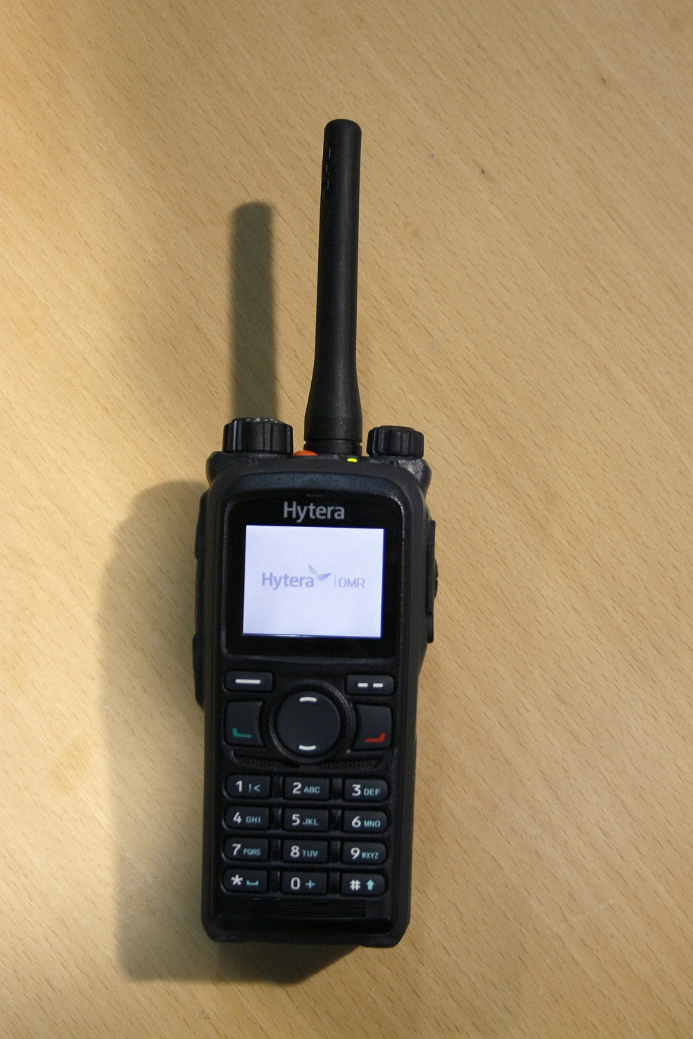 Ein DMR/Mototrbo digitales Handfunkgerät. Hytera PD785